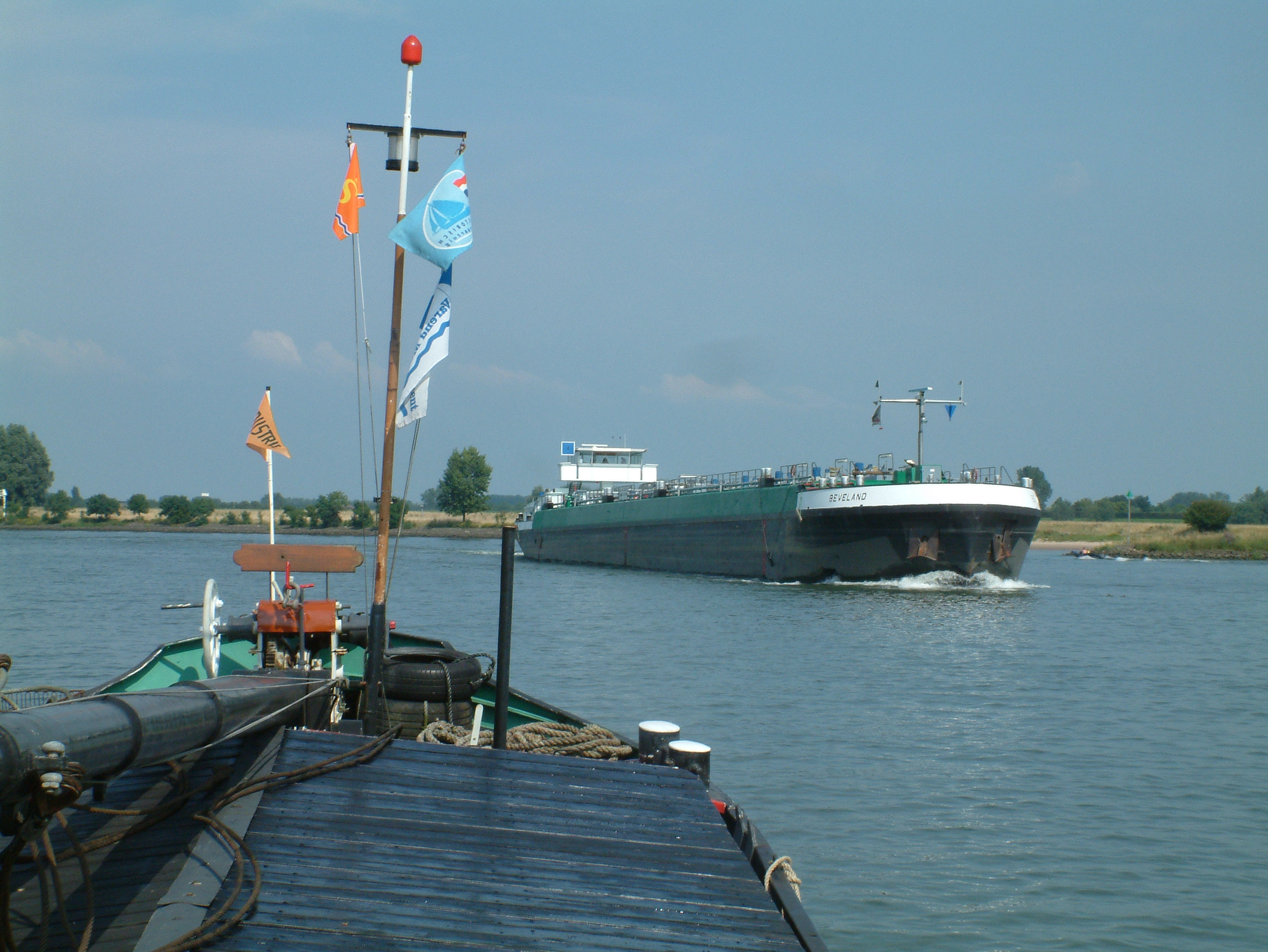 Blauwe bord getoond door de afvaart op de Lek Scheepsnaam: Beveland Afmetingen: 109,90 x 11,40 x 3,30 , 2762 ton Gebouwd in 1998 door De Kaap in Meppel en Smits in Krimpen aan de IJssel Motoren: 1650 hp ABC en 600 hp Detroit Verhaar bowthruster Ex Pax Montana Europanummer: 2323406